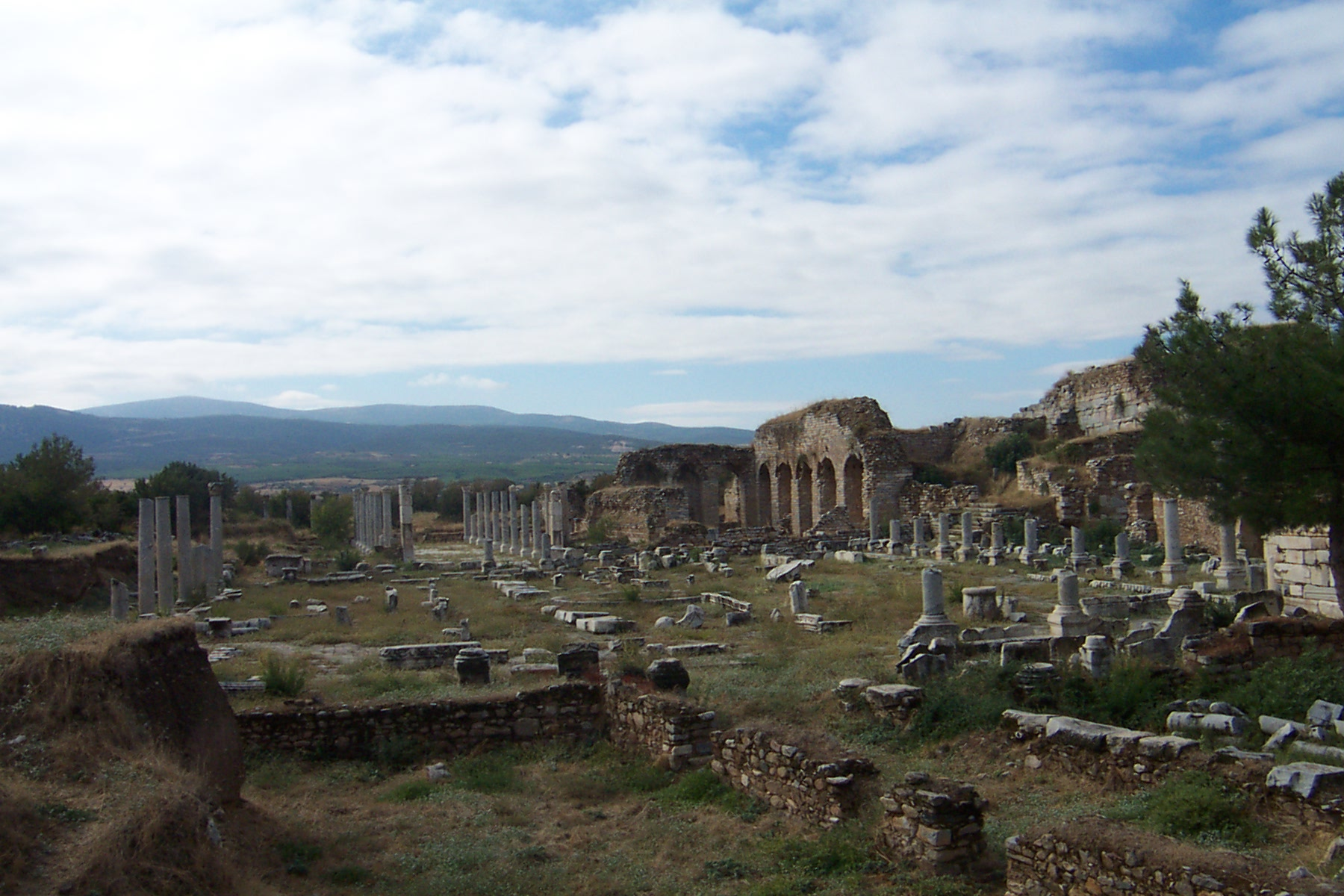 Aphrodisias, Turkey